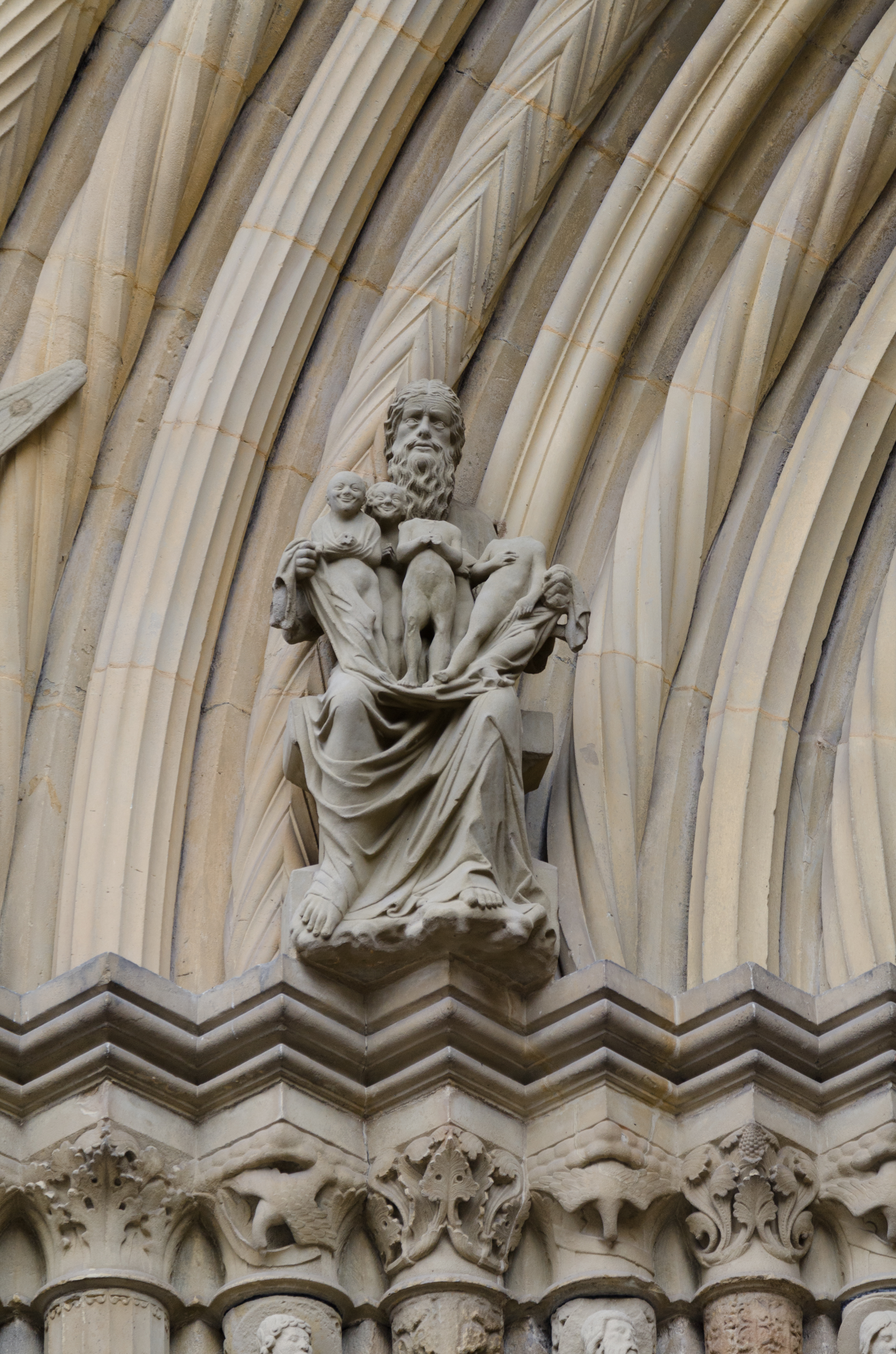 Bamberg, Dom, Fürstenportal, Details